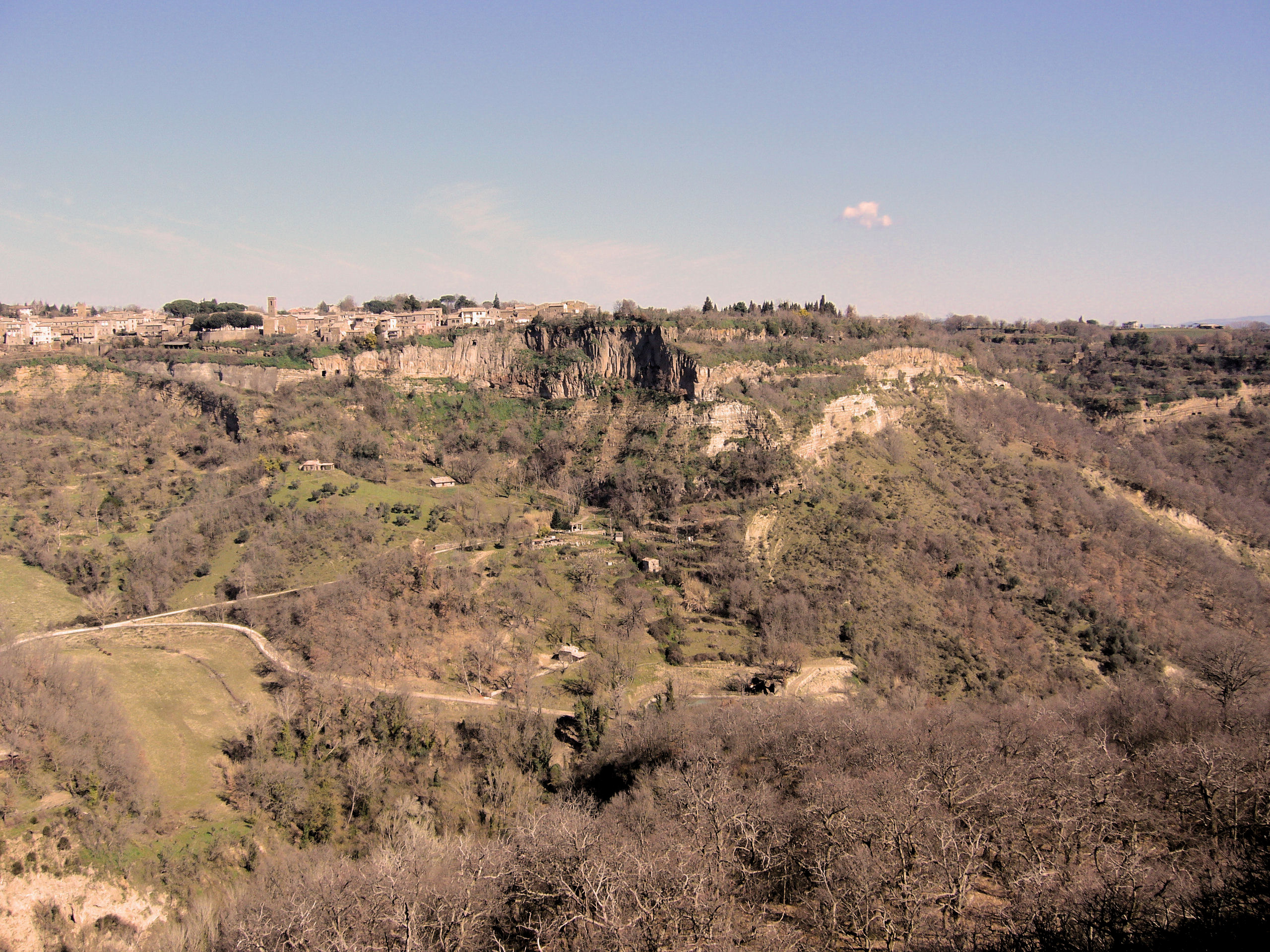 vista di Lubriano dalla castagneta di Civita di Bagnoregio.